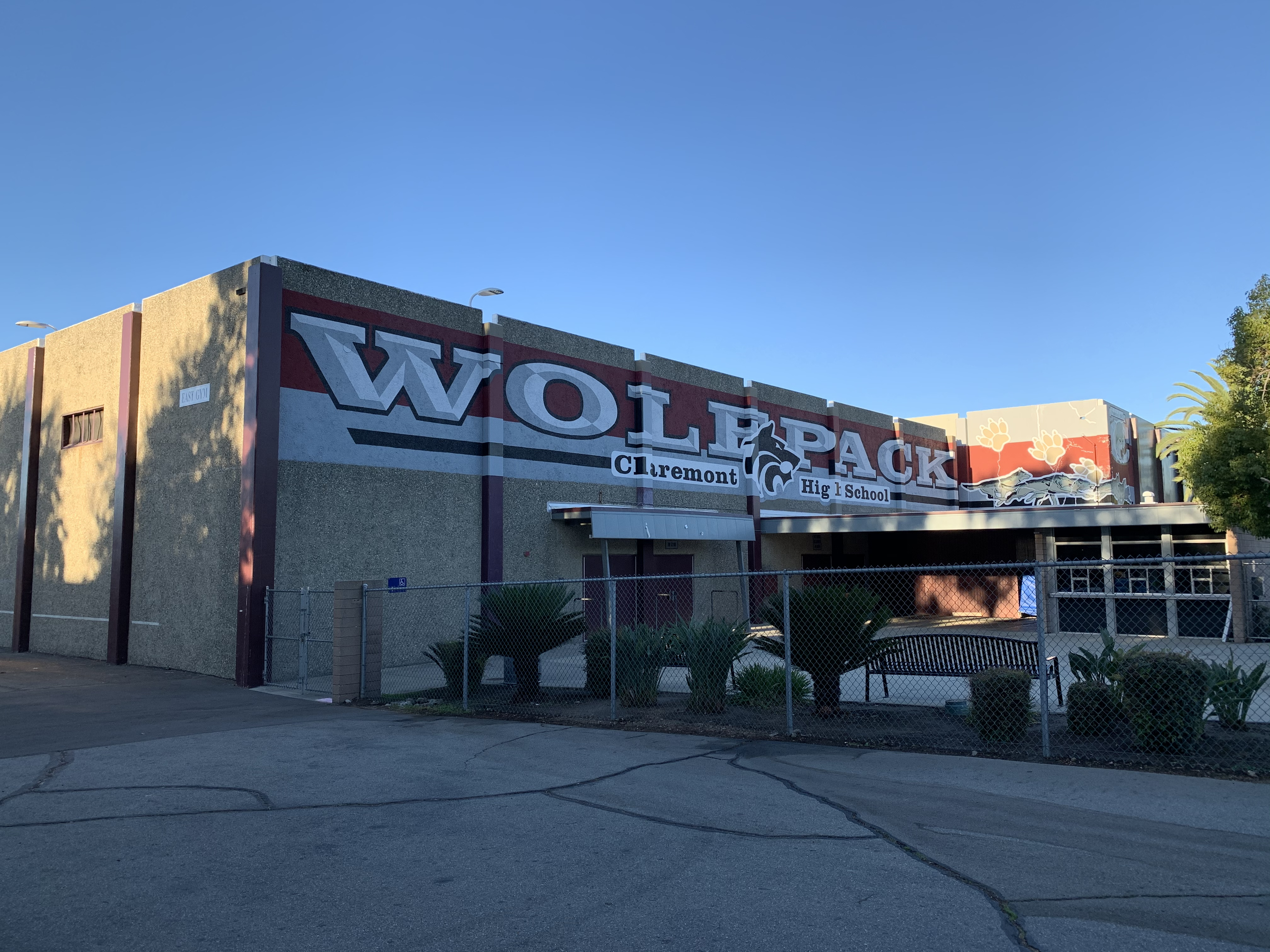 这个文件是克莱尔蒙特高中的体育馆。